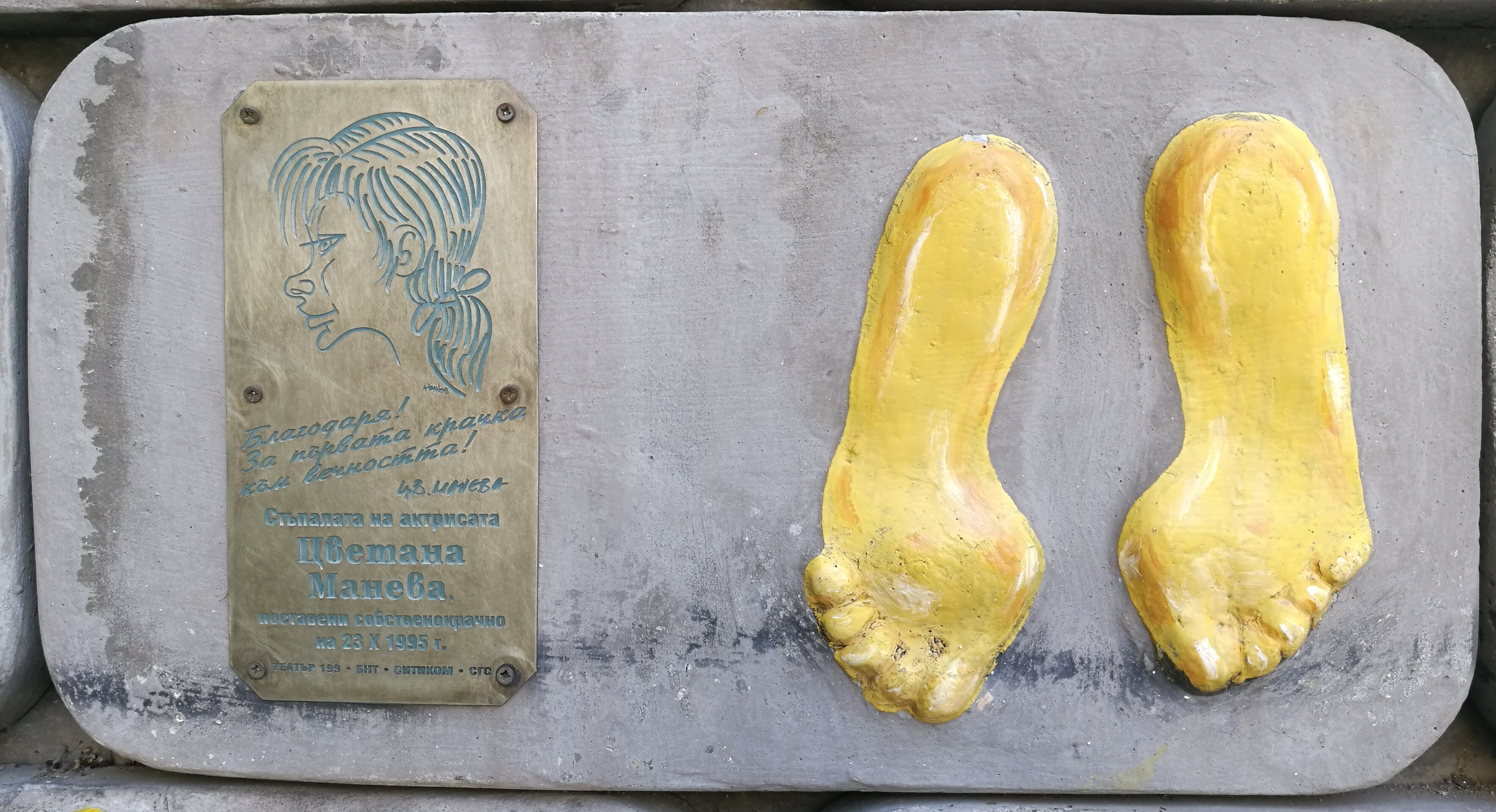 Стената на славата пред Театър 199 - пано с отпечатъци, послание и шарж на Цветана Манева.